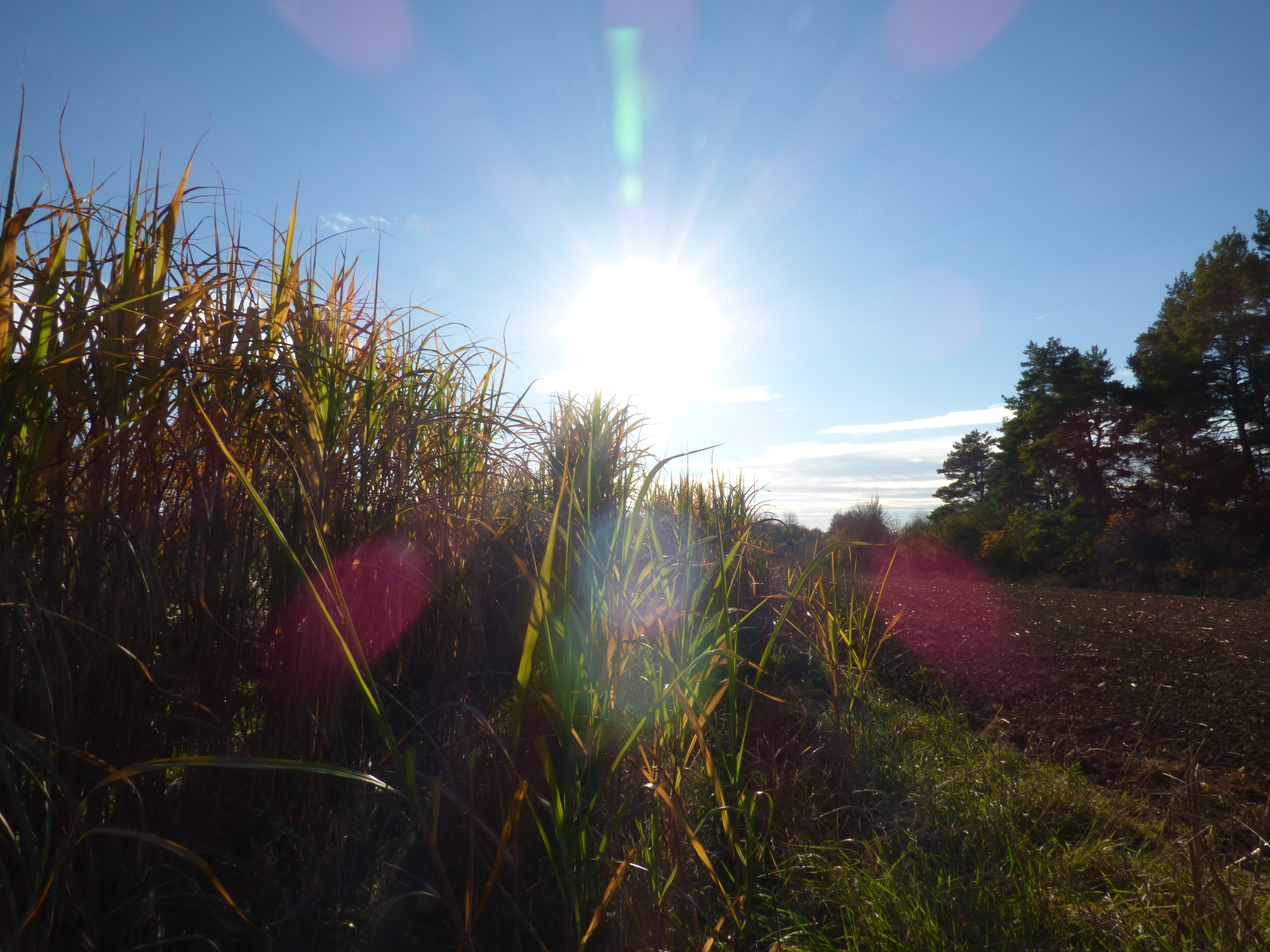 Abgeernteter, umgegrabener Acker und noch stehende Maispflanzen in Heimsheim, DE